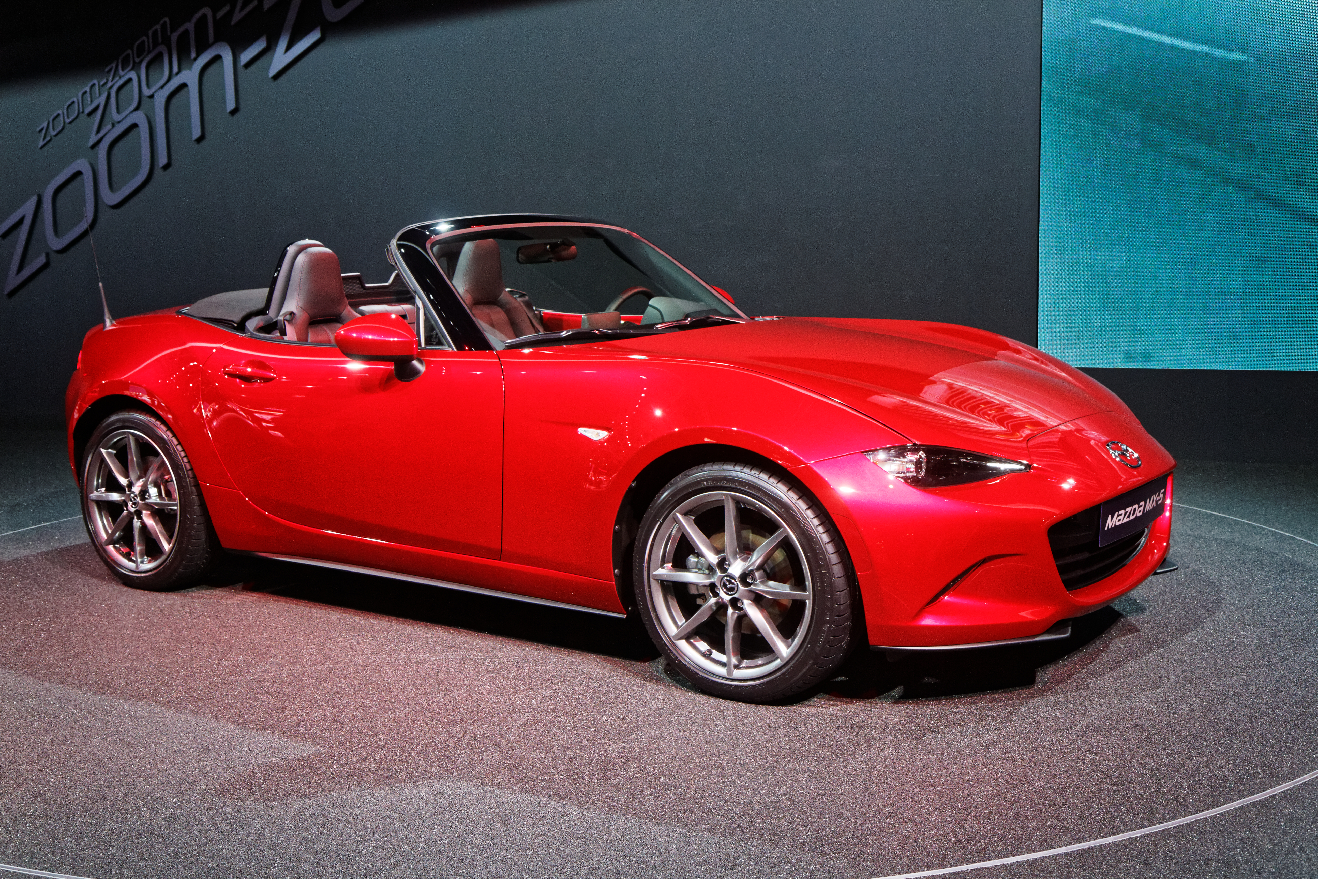 Une Mazda MX-5 présentée lors du mondial de l'automobile de Paris 2014.